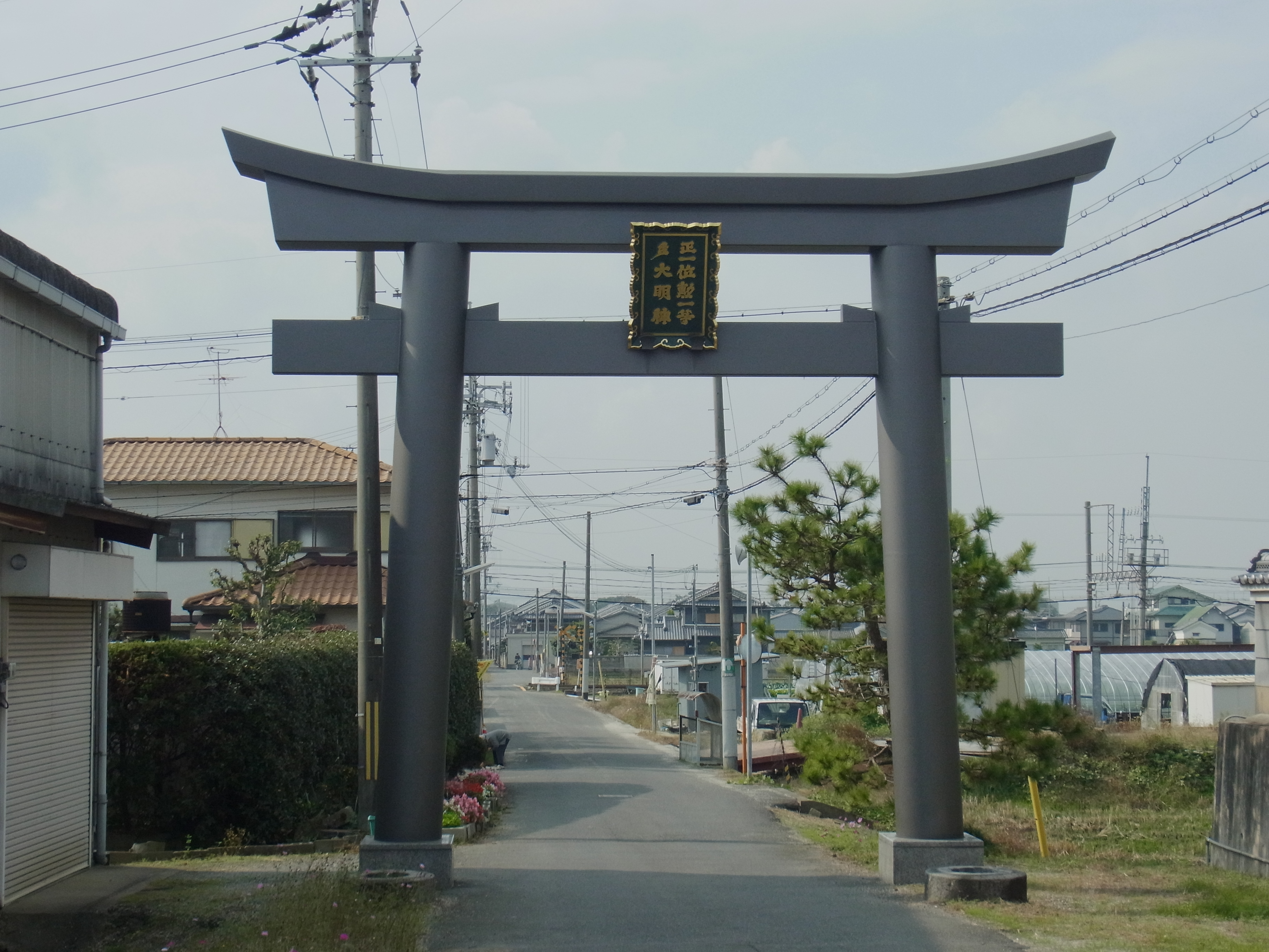 田原本町多にて 多神社の鳥居 Shrine gate of Ō-jinja 2011.11.13